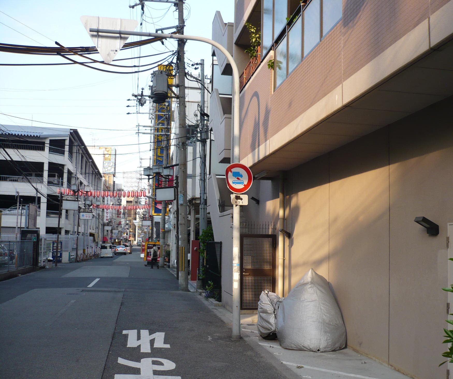 堀城推定地